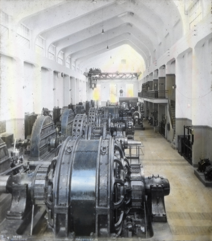 Interiør fra Høyanger kraftverk, antakelig K1A, i 1926. Håndkolorert dias.